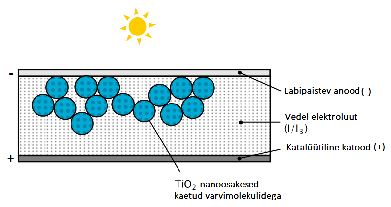 Päikeseraku ülesehitus